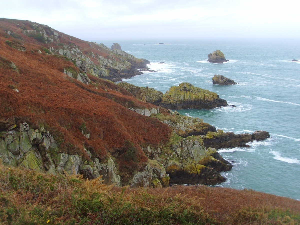 Falaises de Beuzec-Cap-Sizun (secteur de Toull ar Marc'h Du), Finistère, France